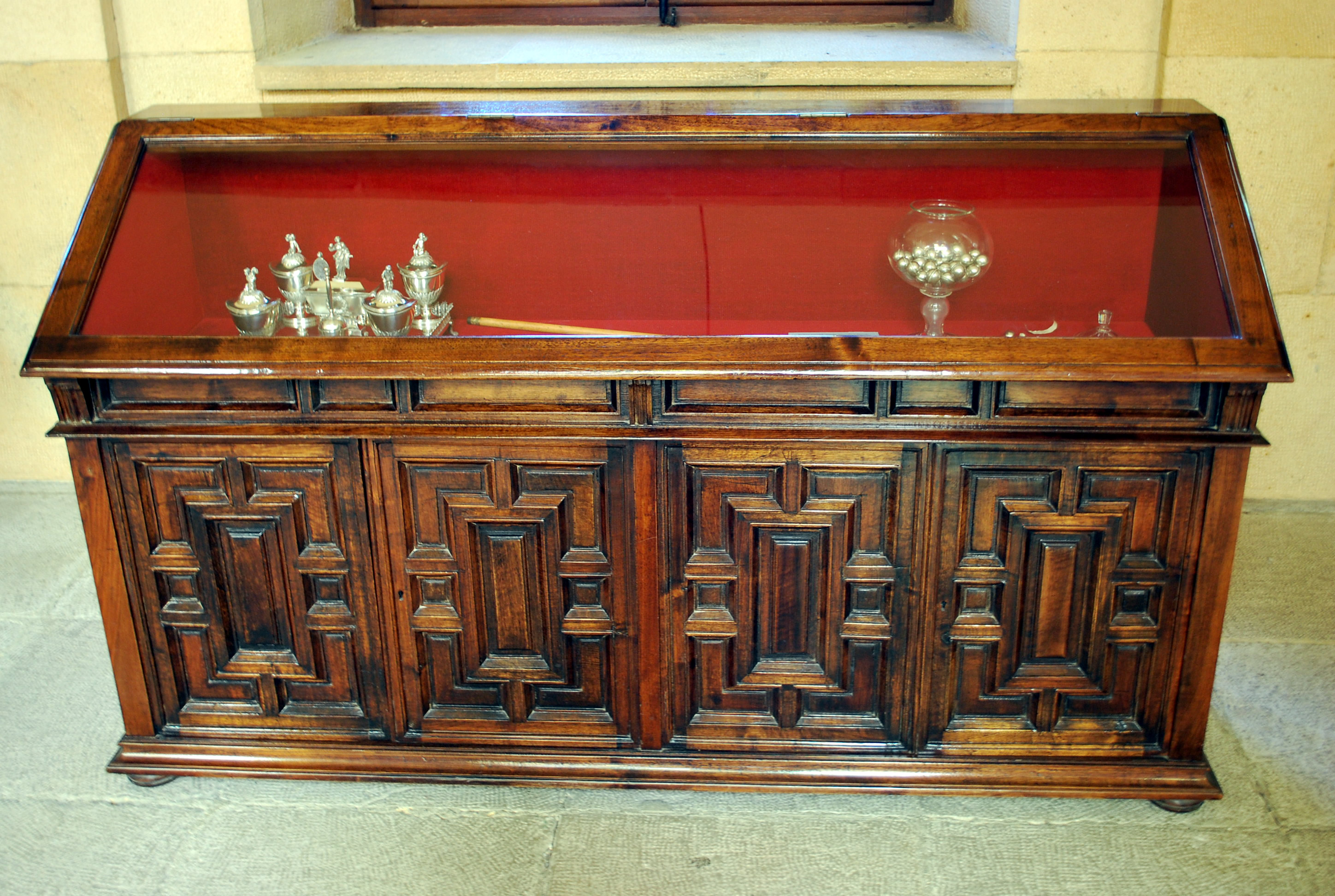 Billes creuses en argent utilisées pour les votes des Juntas (assemblées) (XVIIe siècle) (salle attenante du Parlement à Gernika - Biscaye).